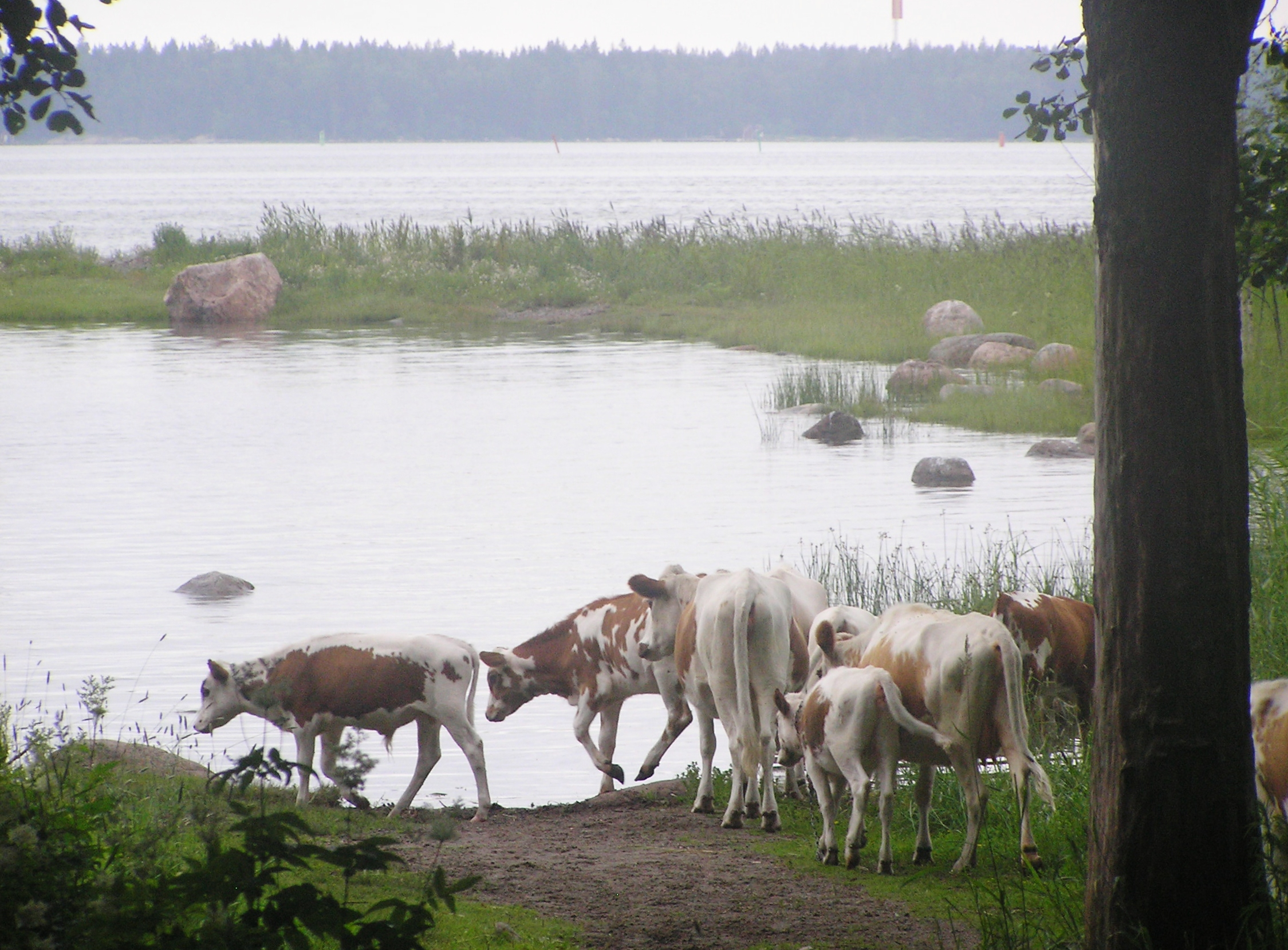 Eastern Finncattle stock of Miina Äkkijyrkkä.